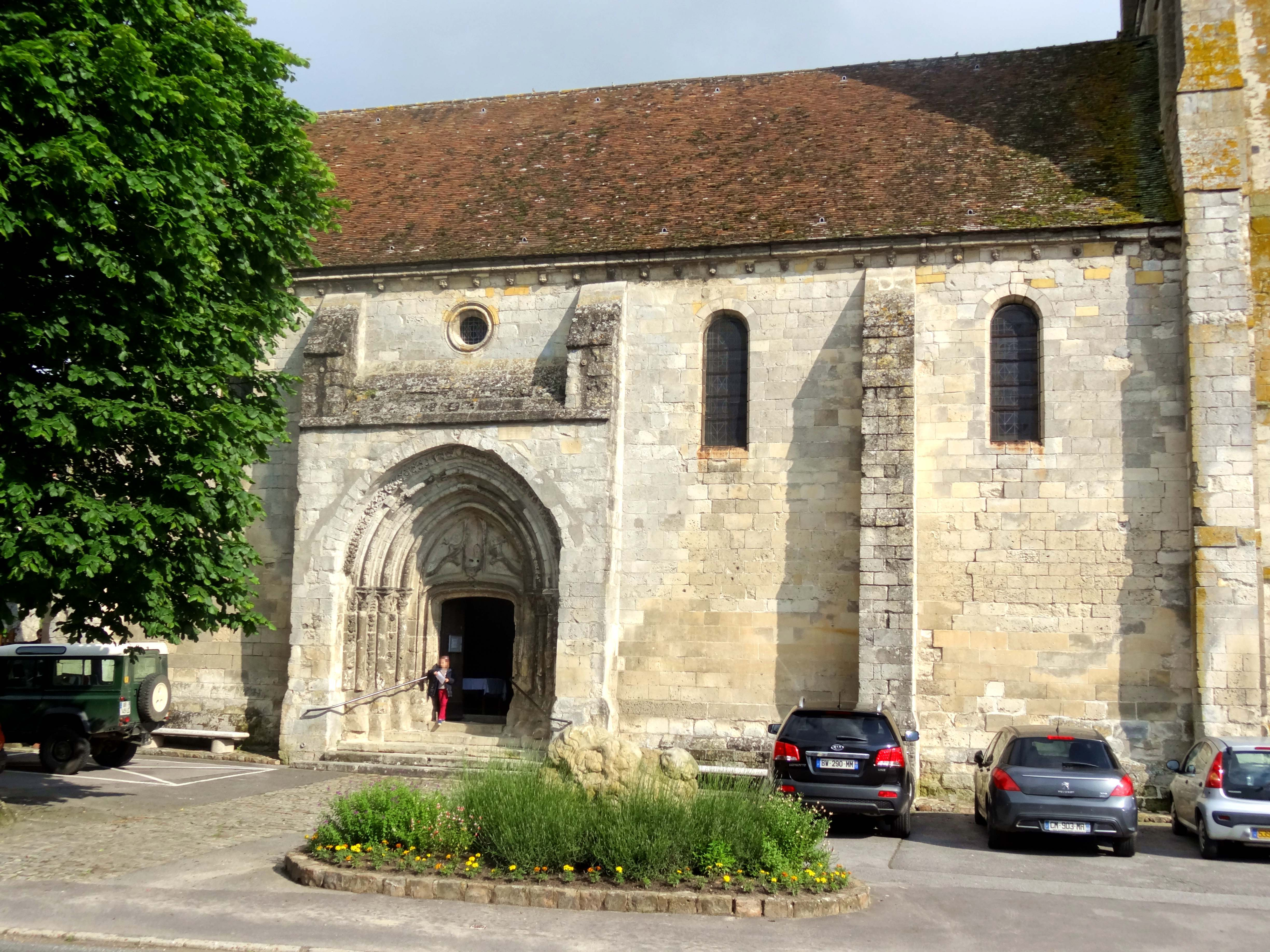 Église Saint-Barthélemy de Villeneuve-sur-Verberie - voir titre.